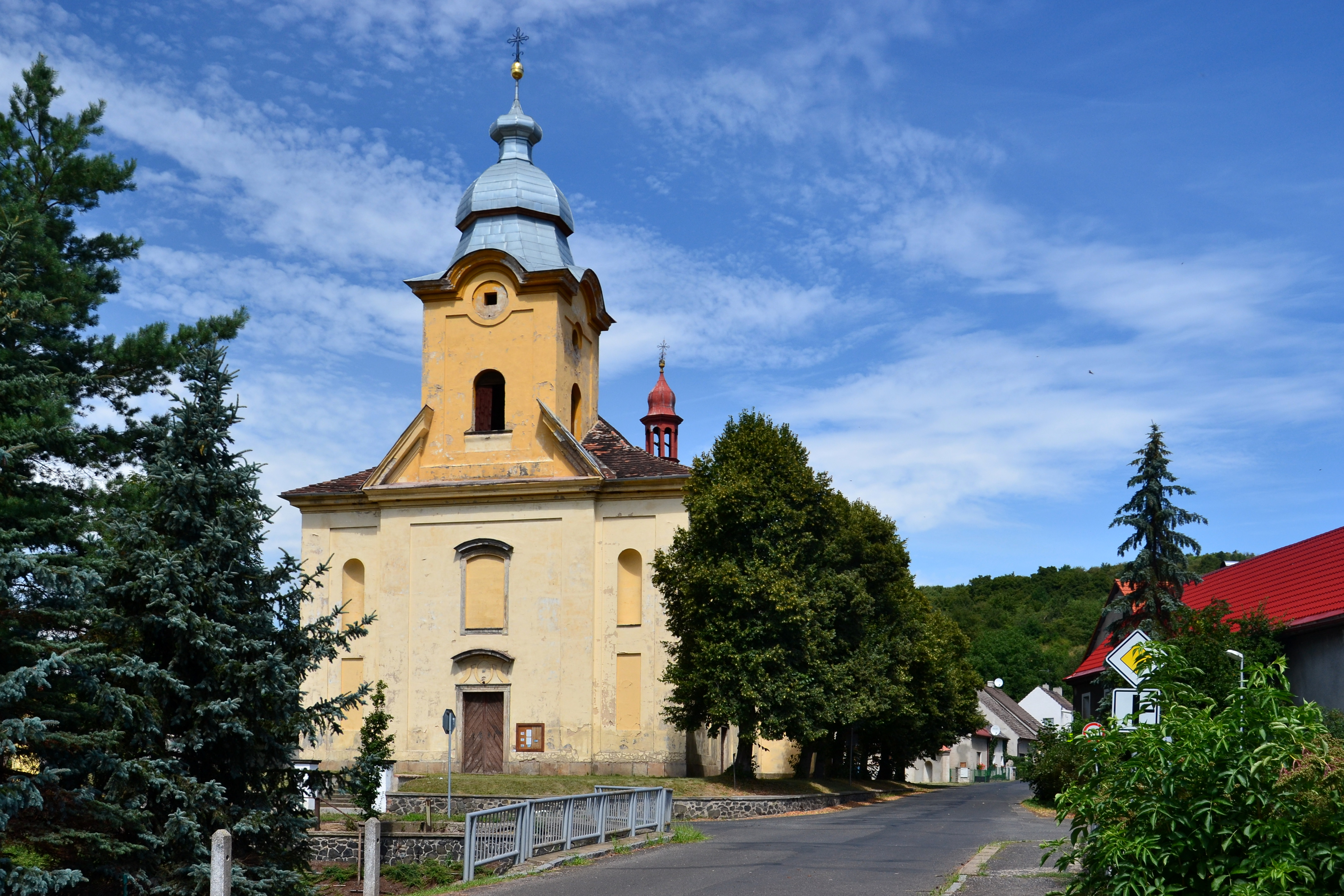 Kostel svatého Martina, Rtyně nad Bílinou.